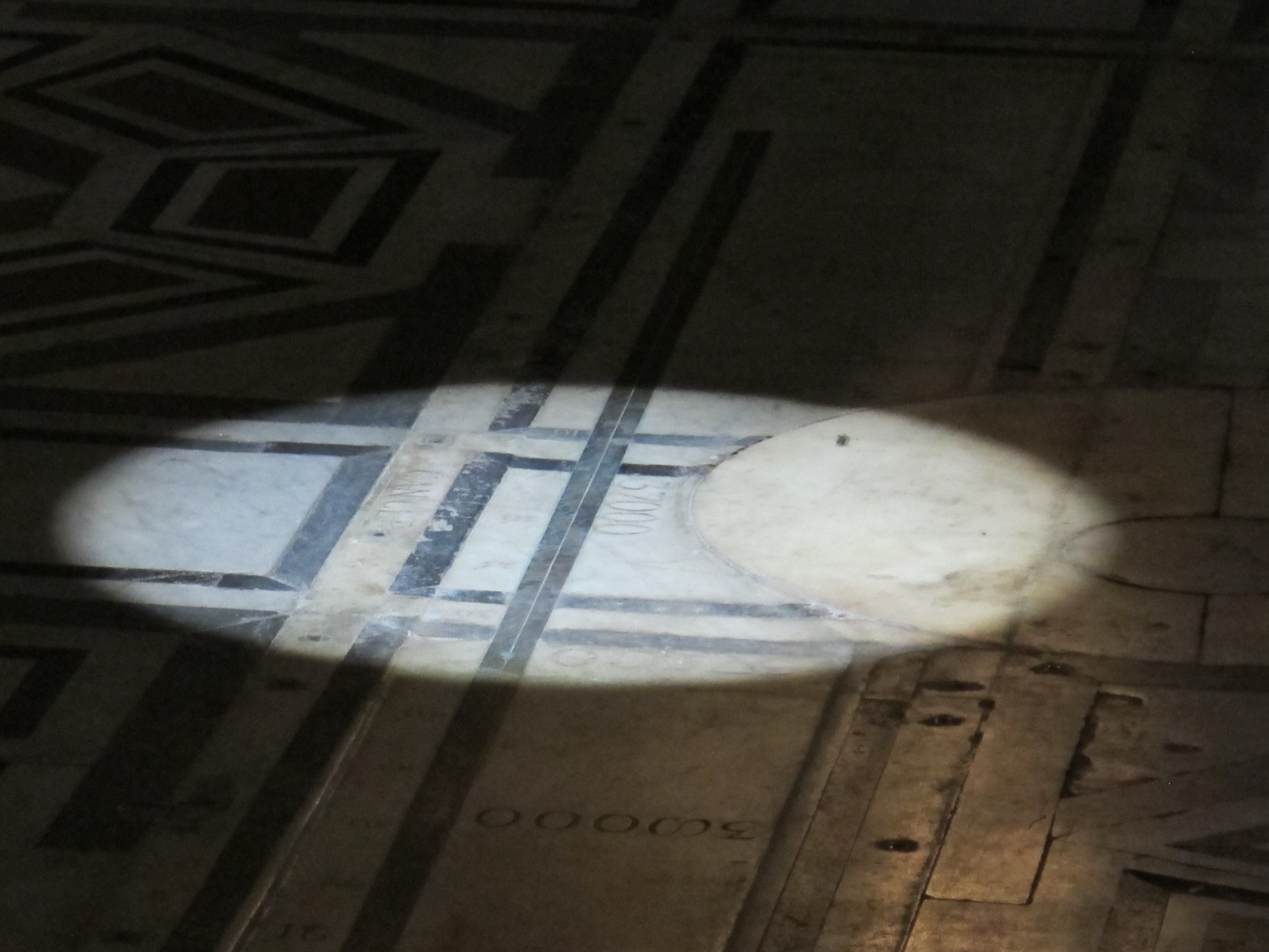 Osservazione del solstizio 21.06.12, fi